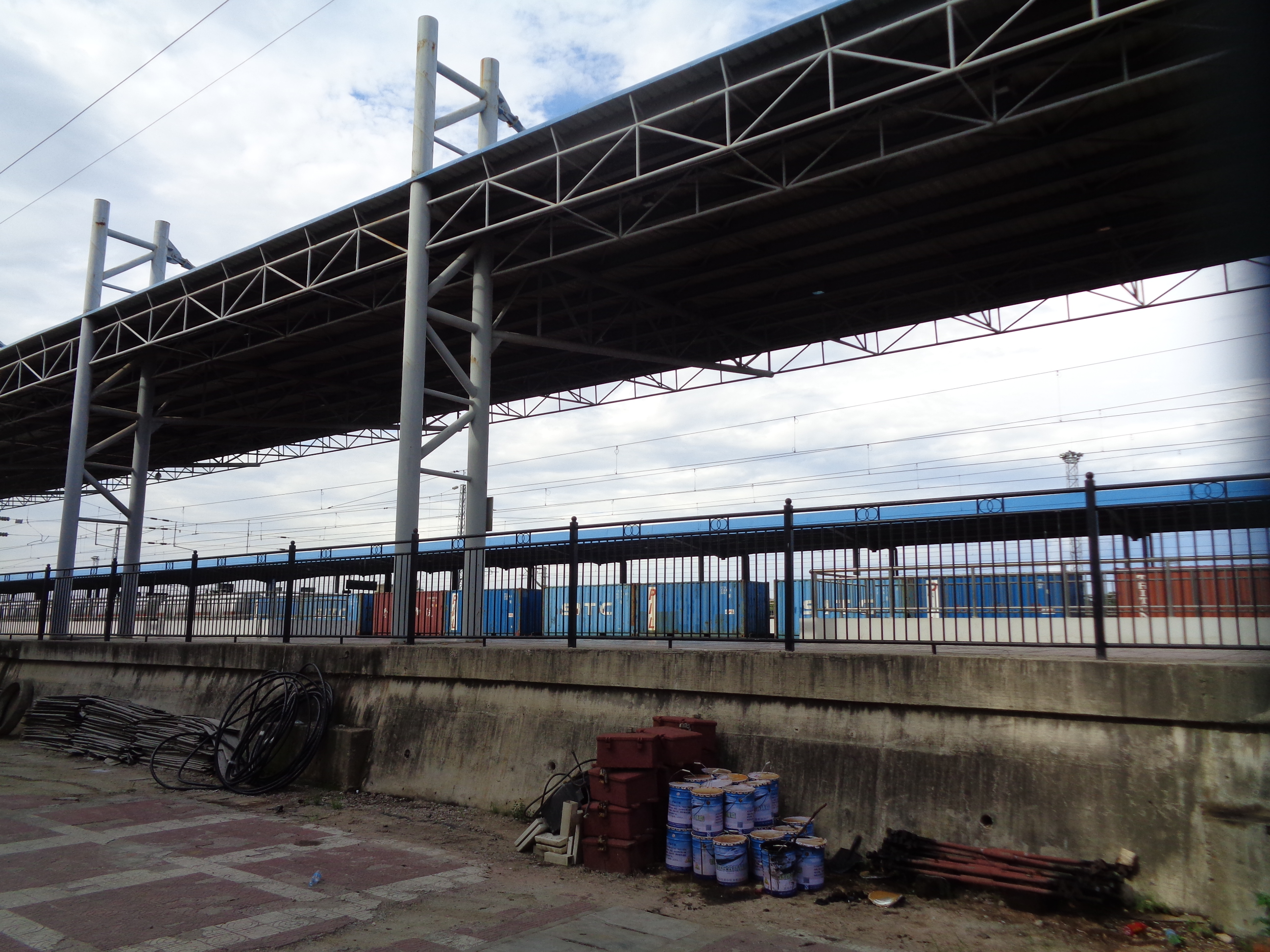 西安市长安区引镇街道西安南站实景